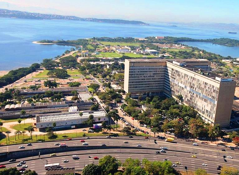 Cidade Universitária da UFRJ. Prédios do Hospital, CCS, IPPMG e EEFD.